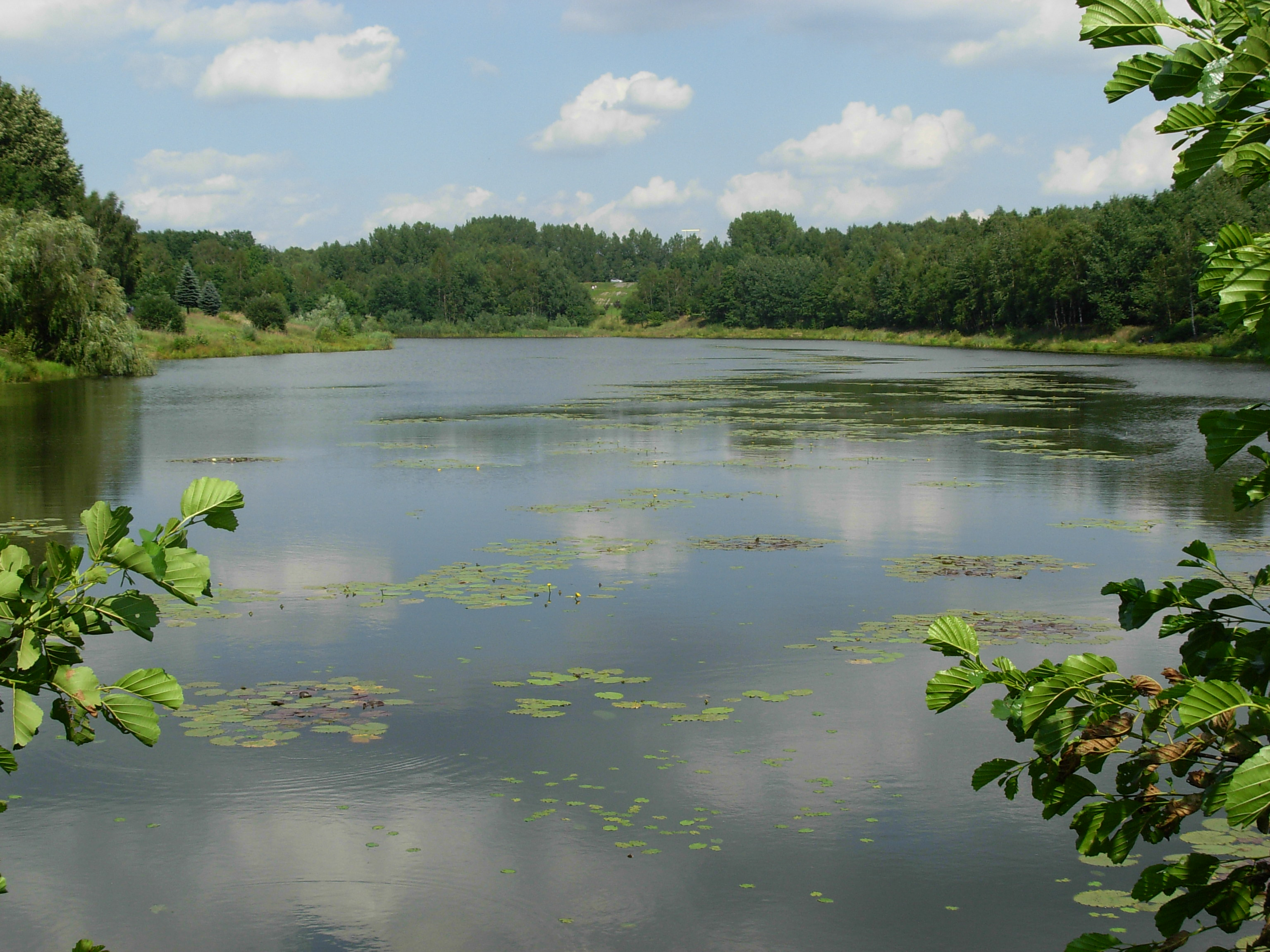 Katowice Dolina Trzech Stawów